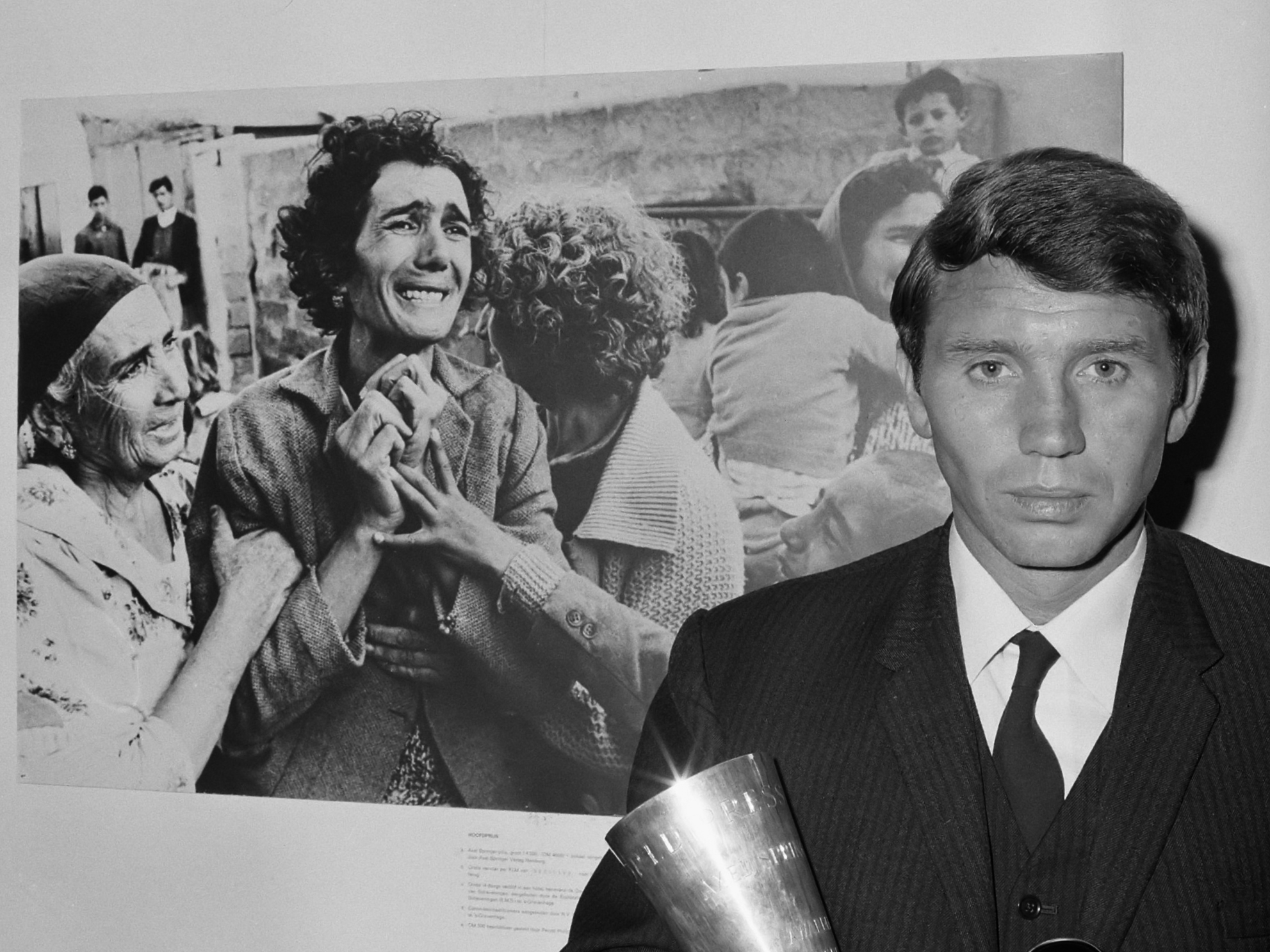 World Press Photo 1964 , Donald McCullin bij zijn foto 17 december 1964